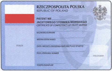 Awers patentu z 2006 roku jachtowego sternika morskiego.